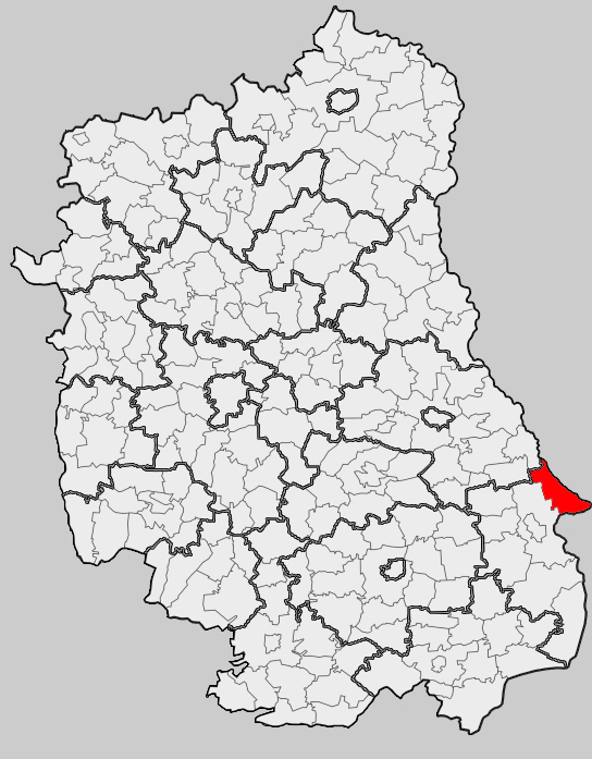 Map of gmina Horodło, Hrubieszów county, Lublin voivodship Mapa gminy Horodło, powiat hrubieszowski, województwo lubelskie